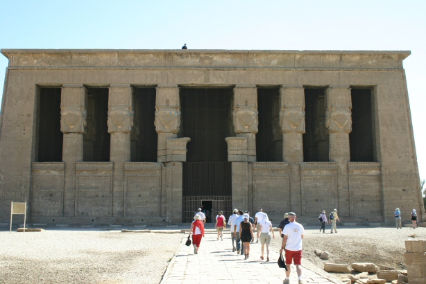 Templo de Hathor Temple of Denderah. Image taken by Alex Lbh in April 2005.